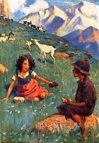 Jessie Willcox Smith (1863-1935) illustrated the David McKay Company's 1922 publication of Heidi.